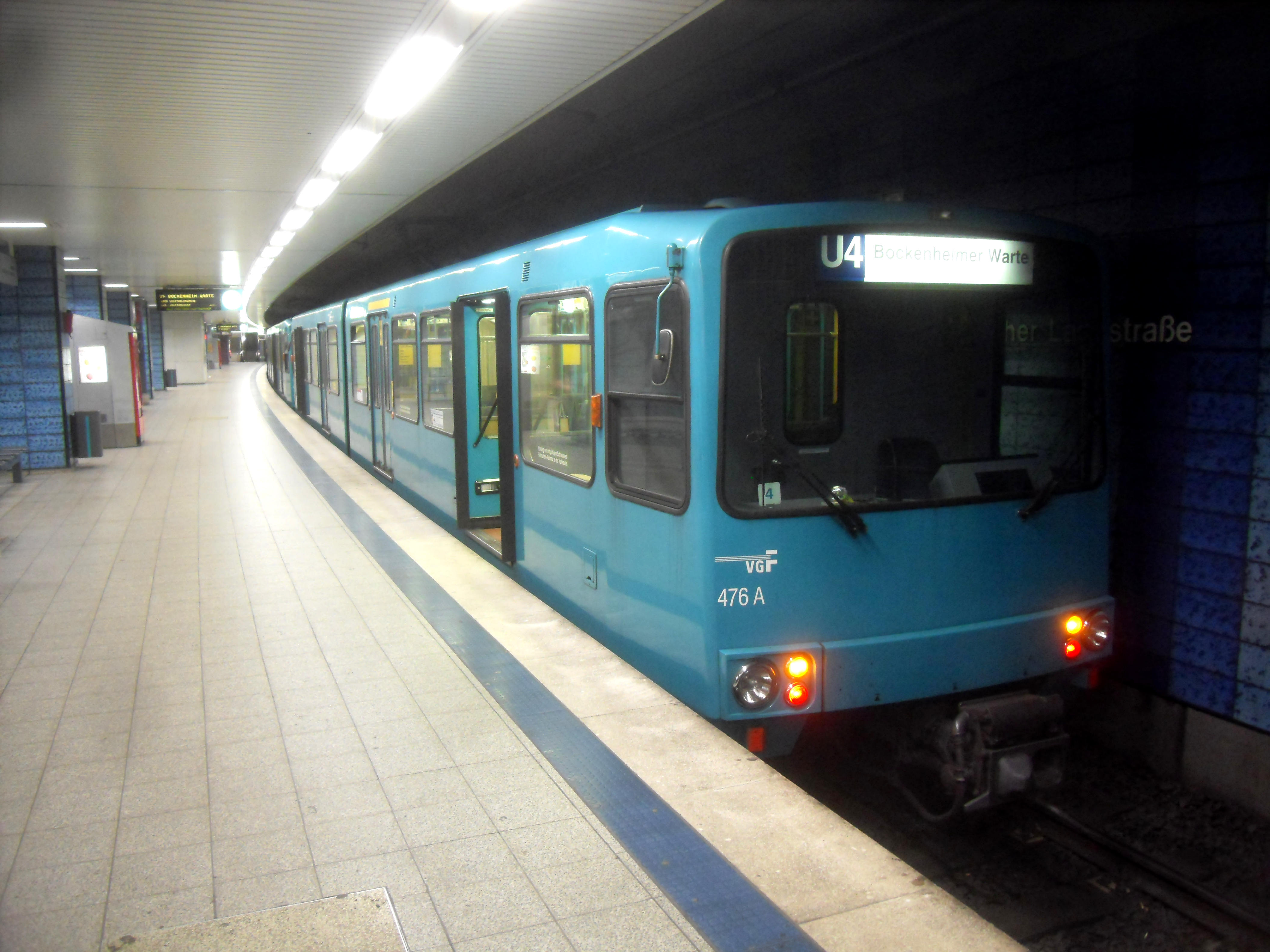 U 3-Triebwagen der U-Bahn Frankfurt im U-Bahnhof Seckbacher Landstraße auf der Linie U 4 auf dem Weg nach Bockenheimer Warte in Hessen (Deutschland)